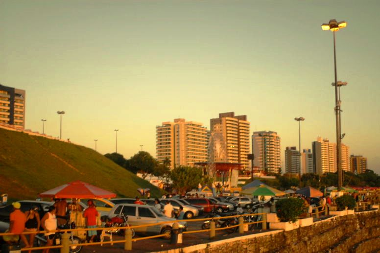 Orla da Ponta negra, em Manaus, às margens do Rio Negro. Há alguns quilômetros dali está o encontro com o Rio Solimões, e mais 6 quilômetros alem há o rio Amazonas.